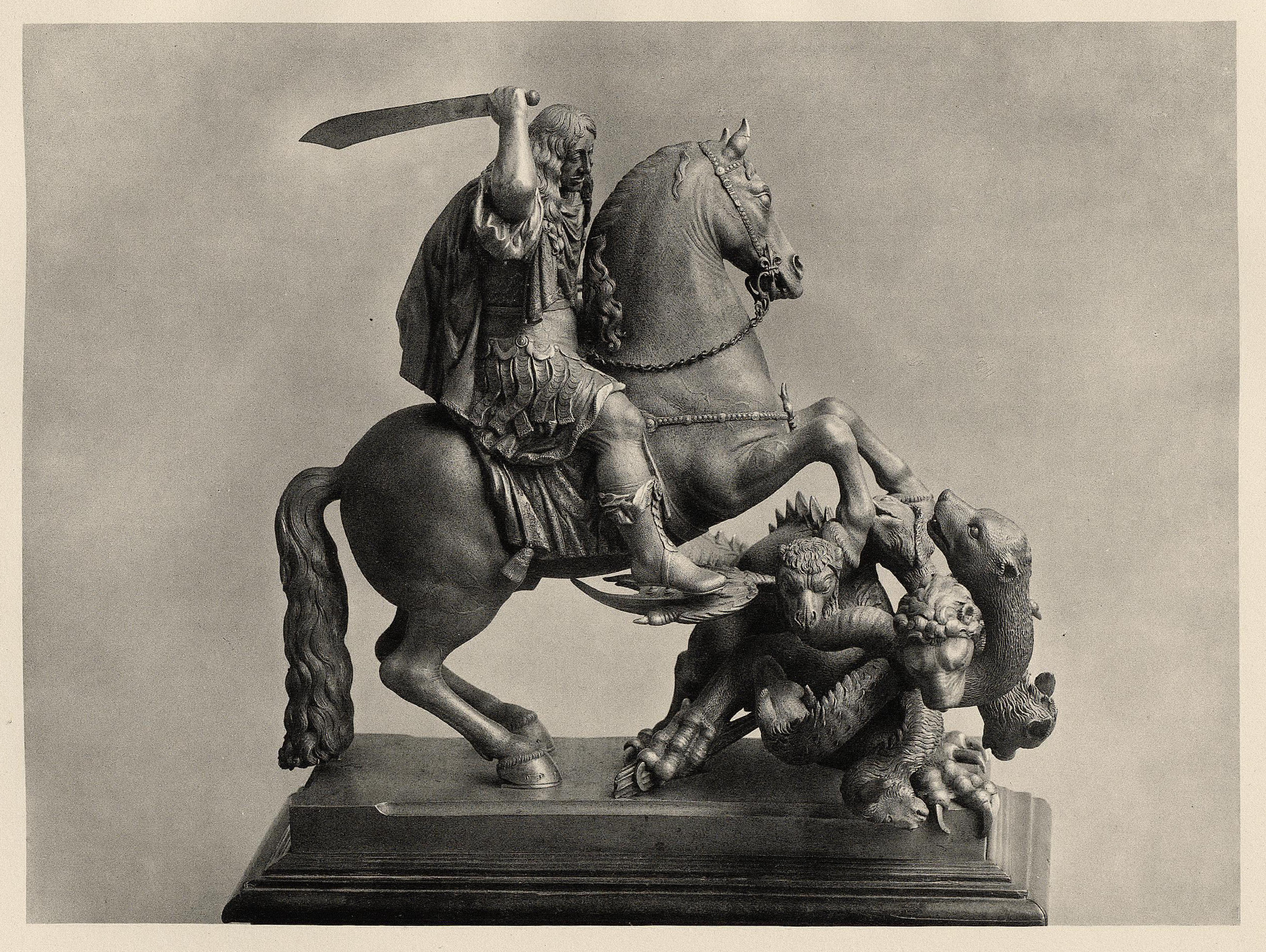 Eisenschnittarbeit: Reiterfigur Karls II. von England (Beschreibung gemäß Quelle) aus: Das Grüne Gewölbe zu Dresden: eine Auswahl von Meisterwerken der Goldschmiedekunst ; in vier Bänden (Band 4): Gefässe und Bildwerke: aus Elfenbein, Horn und anderen Werkstoffen ; Stein, Holz, Bronze, Eisen ; mit 64 Lichtdrucktafeln, davon 3 farbig. Hiersemann, Leipzig